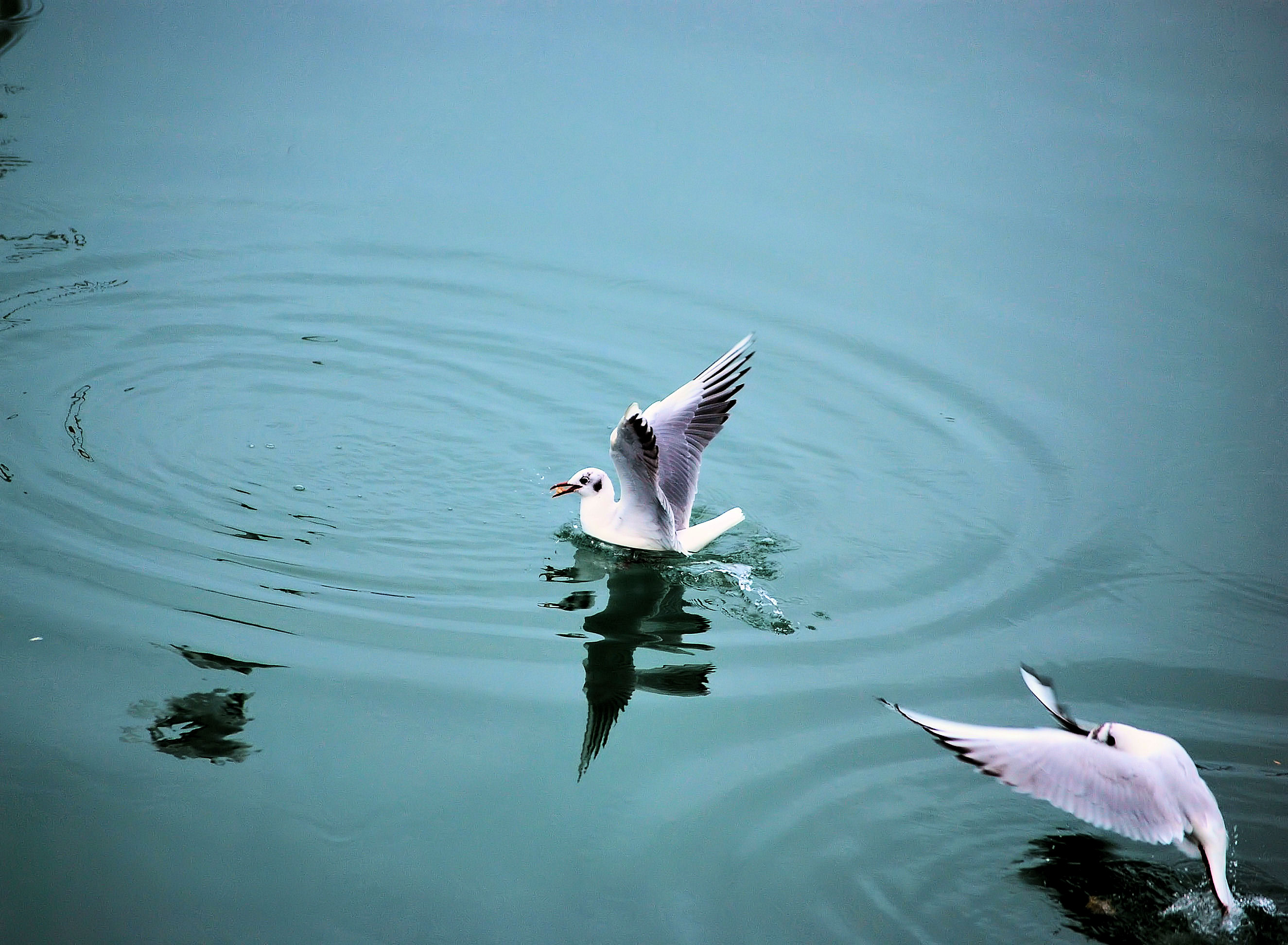 Mouettes rieuses dans la réserve ornithologique de Zumaia (Guipuscoa).